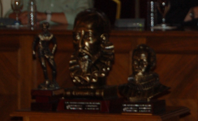 Nueva versión del Trofeo Cervantes